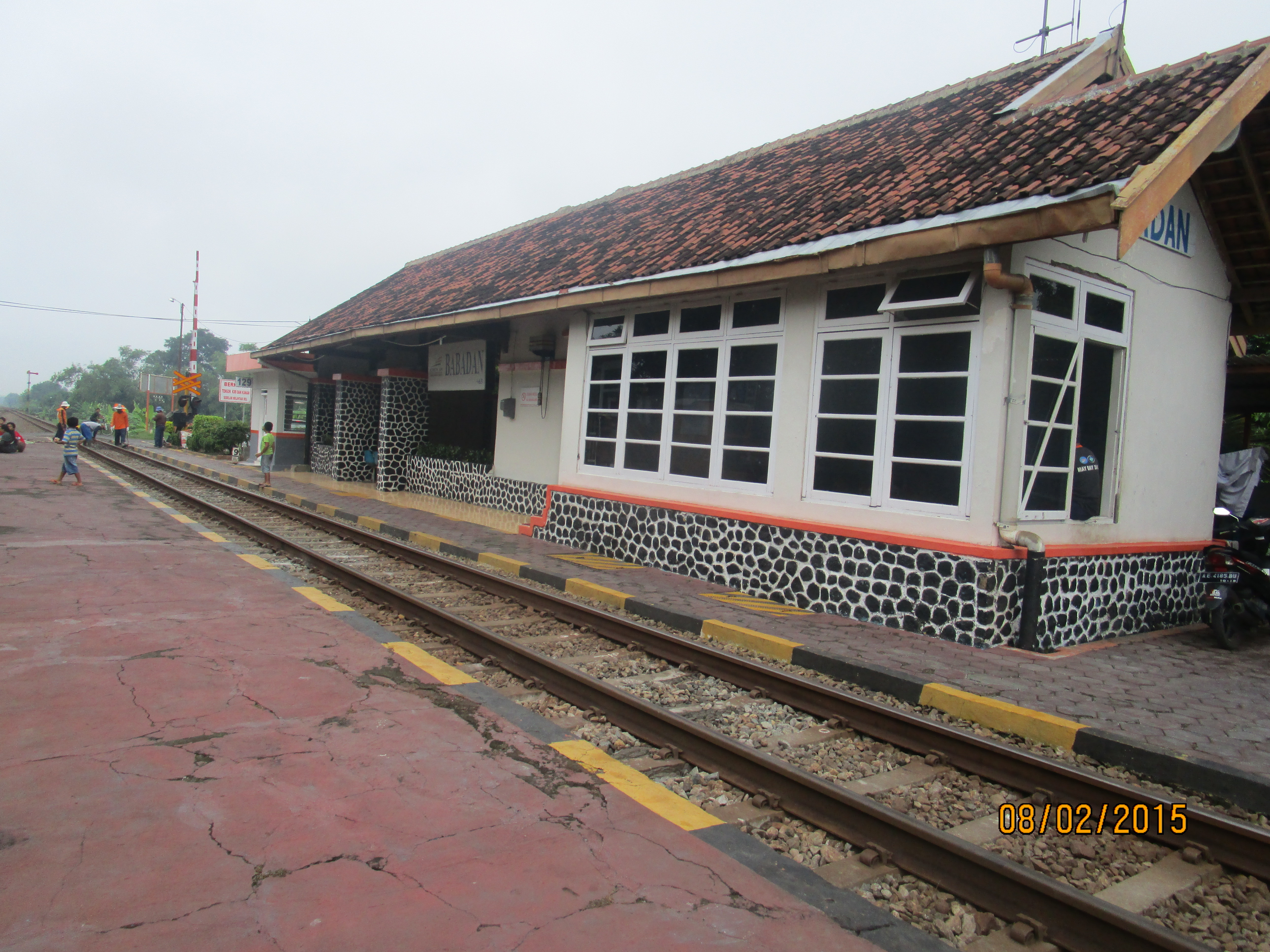 Stasiun Babadan pada pagi hari